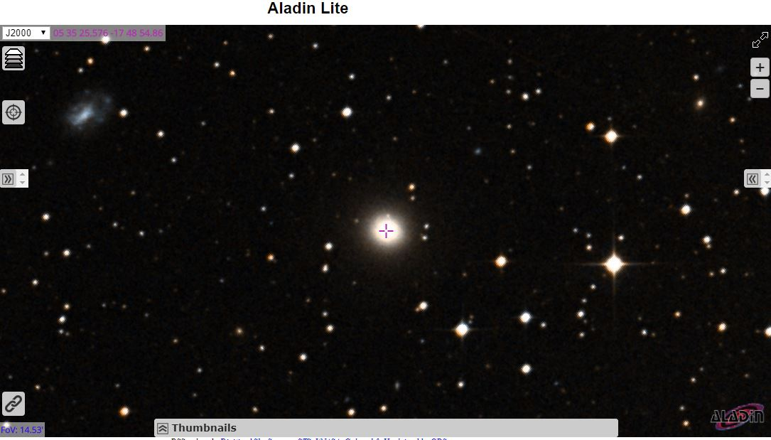 Ces images sont des captures d'écran de la région et de l'objet astronomique affichés par le programme Aladin/Lite que l'on peut utiliser à l'adresse suivante : Le lien dans le texte de la légende permet d'accéder à Aladin Lite et à l'image interactive de l'objet.